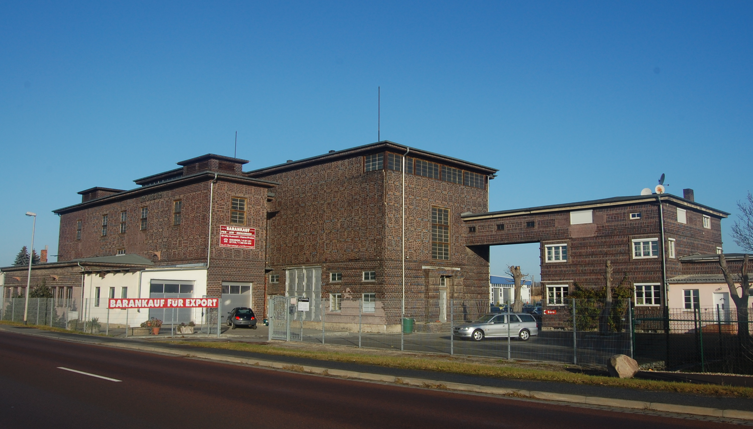 Ehemaliges Umspannwerk in Gröbers